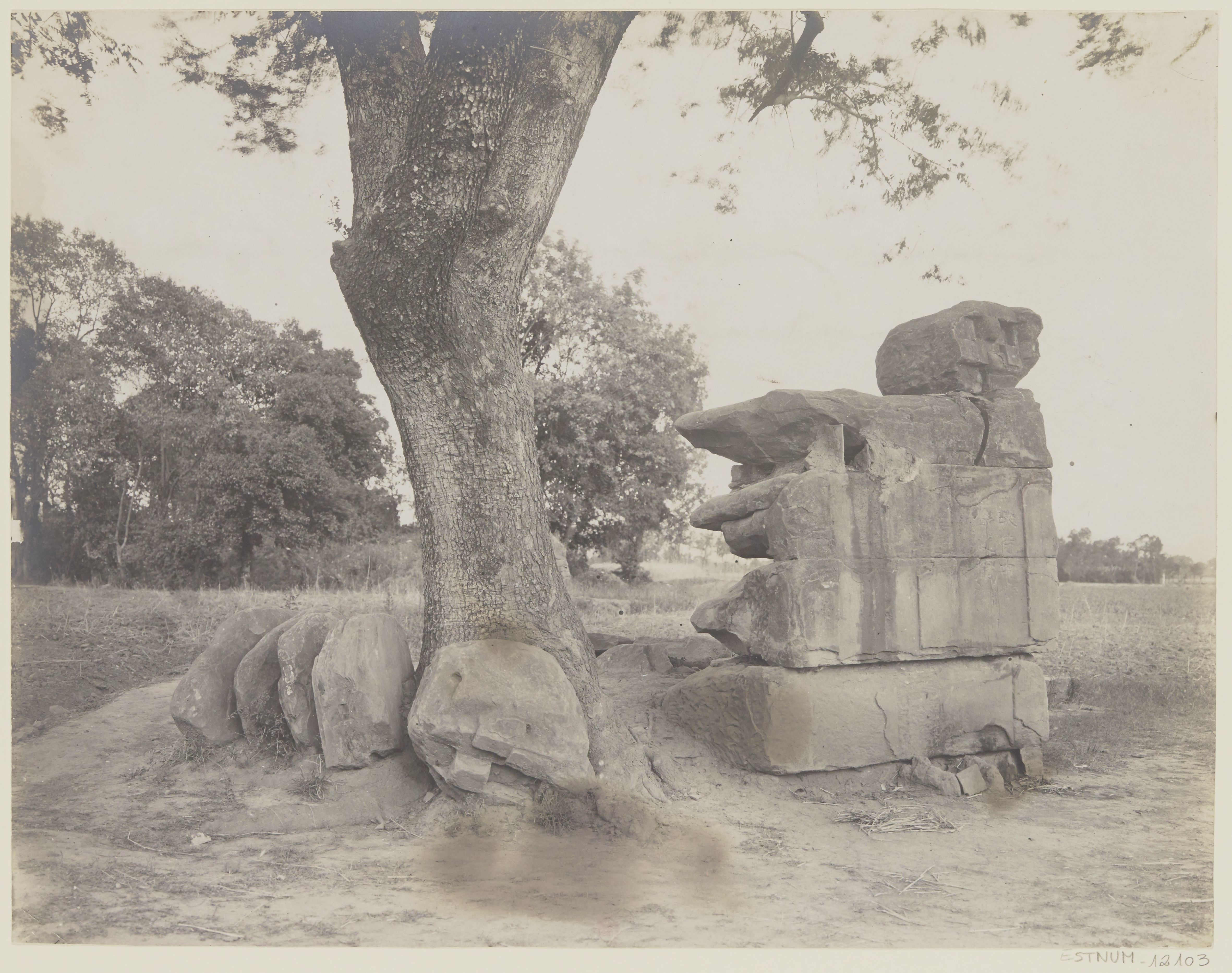 中文（台灣）: 梓潼漢代四闕